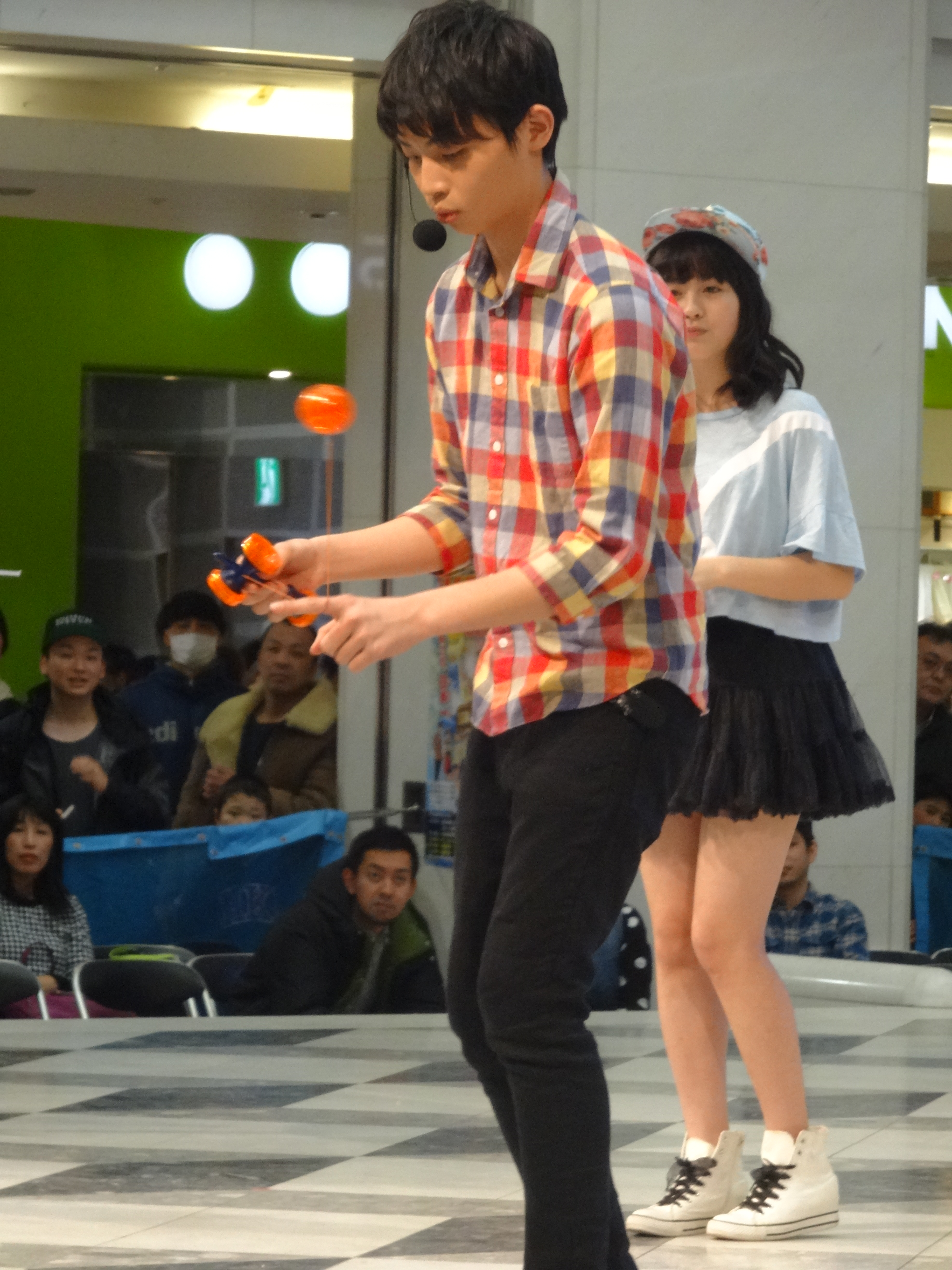 谷井優貴(おはボーイ)。2015年3月15日にサンシャインシティで行われた『KDX FES 日本一決定戦』にて。右端後ろ側に写ってるのは三好杏依(おはガールふわわ)。